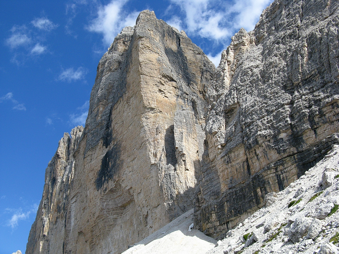 Cima Ovest di Lavaredo - North Face